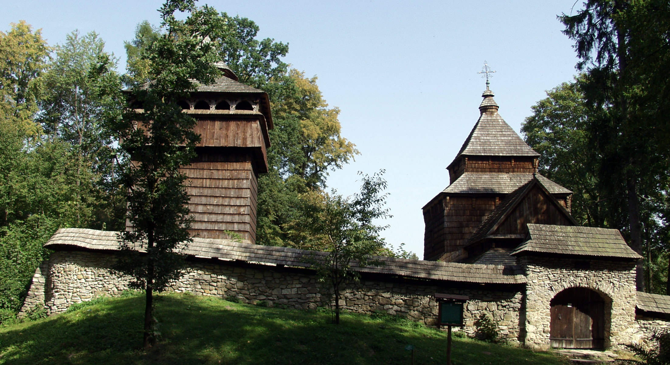 Radruż (Poland), Greek Catholic churchCerkiew greckokatolicka pw. Św. Paraskewy z XVI w.